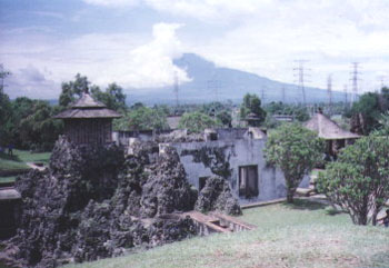 Sunyaragi meditation caves, Cirebon, Indonesia